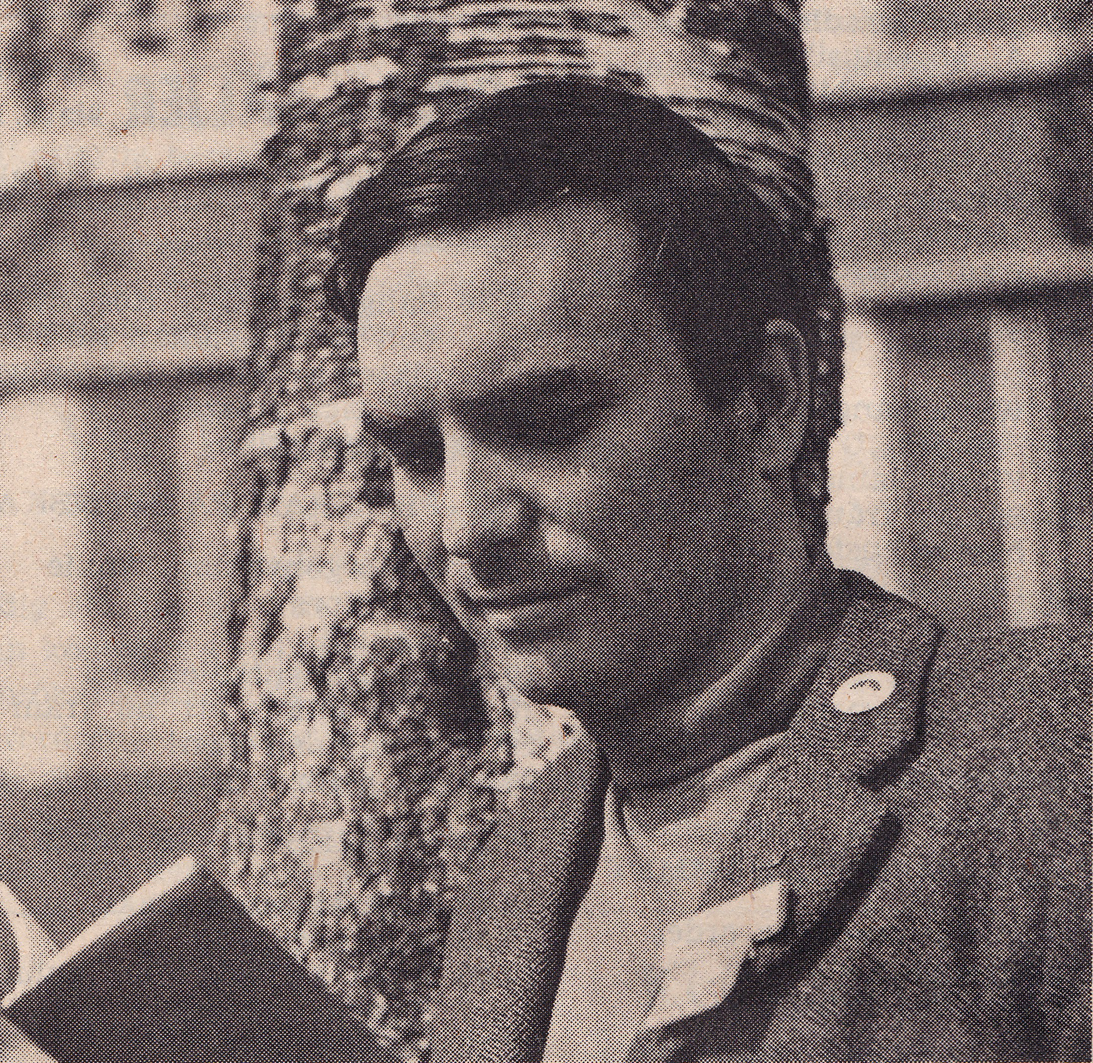 Mikael Reuter.